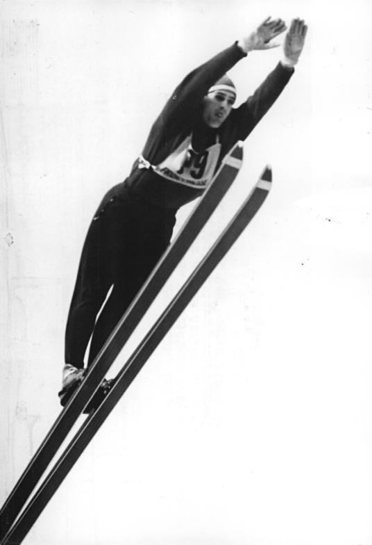 Zentralbild Kohls 23.2.1963 XIV. Deutsche Meisterschaften in den Nordischen Disziplinen Die XIV. Deutschen Meisterschaften in den Nordischen Disziplinen werden vom 20. bis 24. Februar 1963 in Klingenthal-Erzgebirge ausgetragen. UBz: Weltmeister Helmut Recknagel, der den Titel im Spezialsprunglauf zu verteidigen hat, hinterließ am 22.2.1963 auf der großen Aschbergschanze in Klingenthal beim Qualifizierungslauf für die deutsche Meisterschaft den besten Eindruck.